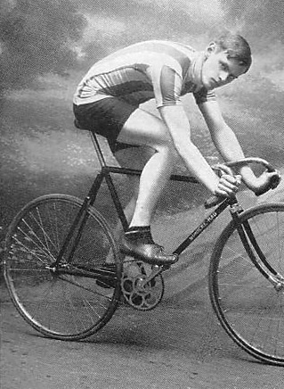 Karl Neumer